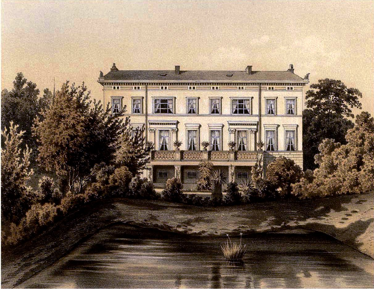 Rittergut Krenzlin